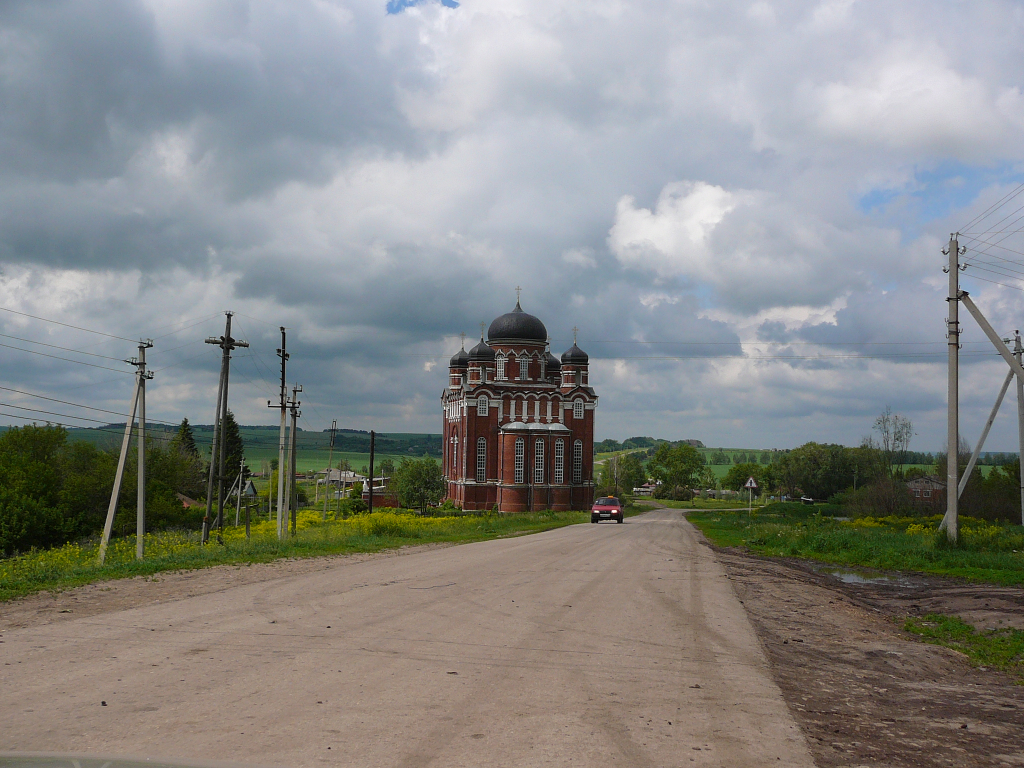 с. Уварово. Церковь Николая Чудотворца